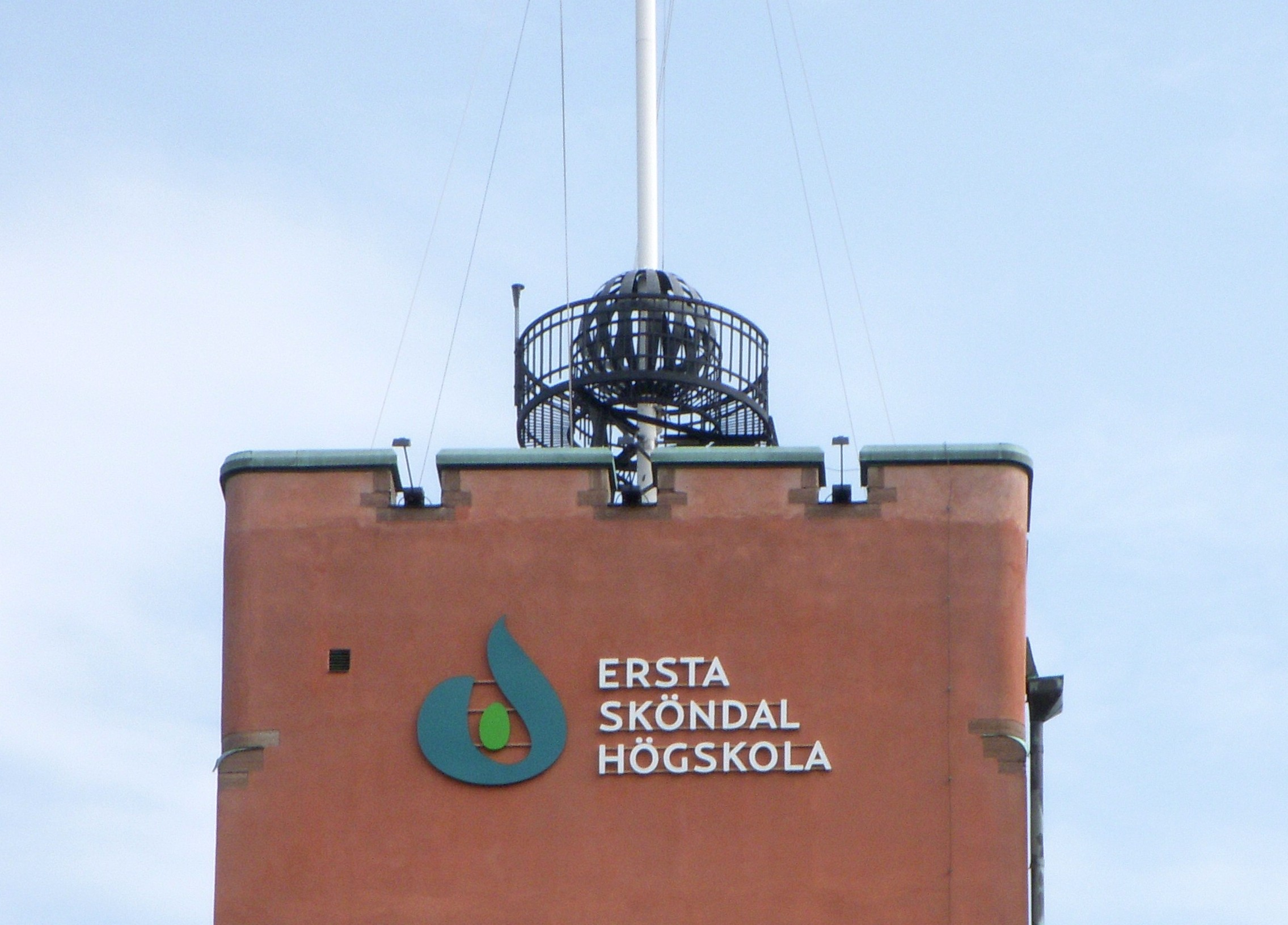 Tidkulan på "Ersta Sköndal Högskola" vid Stigbergsgatan på Södermalm, Stockholm